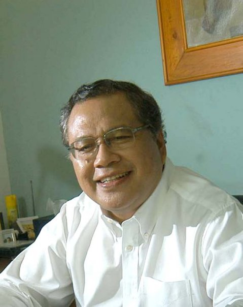 Rizal Ramli, mantan Menteri Ekonomi dan Menteri Keuangan Indonesia